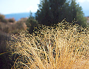 Indianisches Reisgras von Public Domain